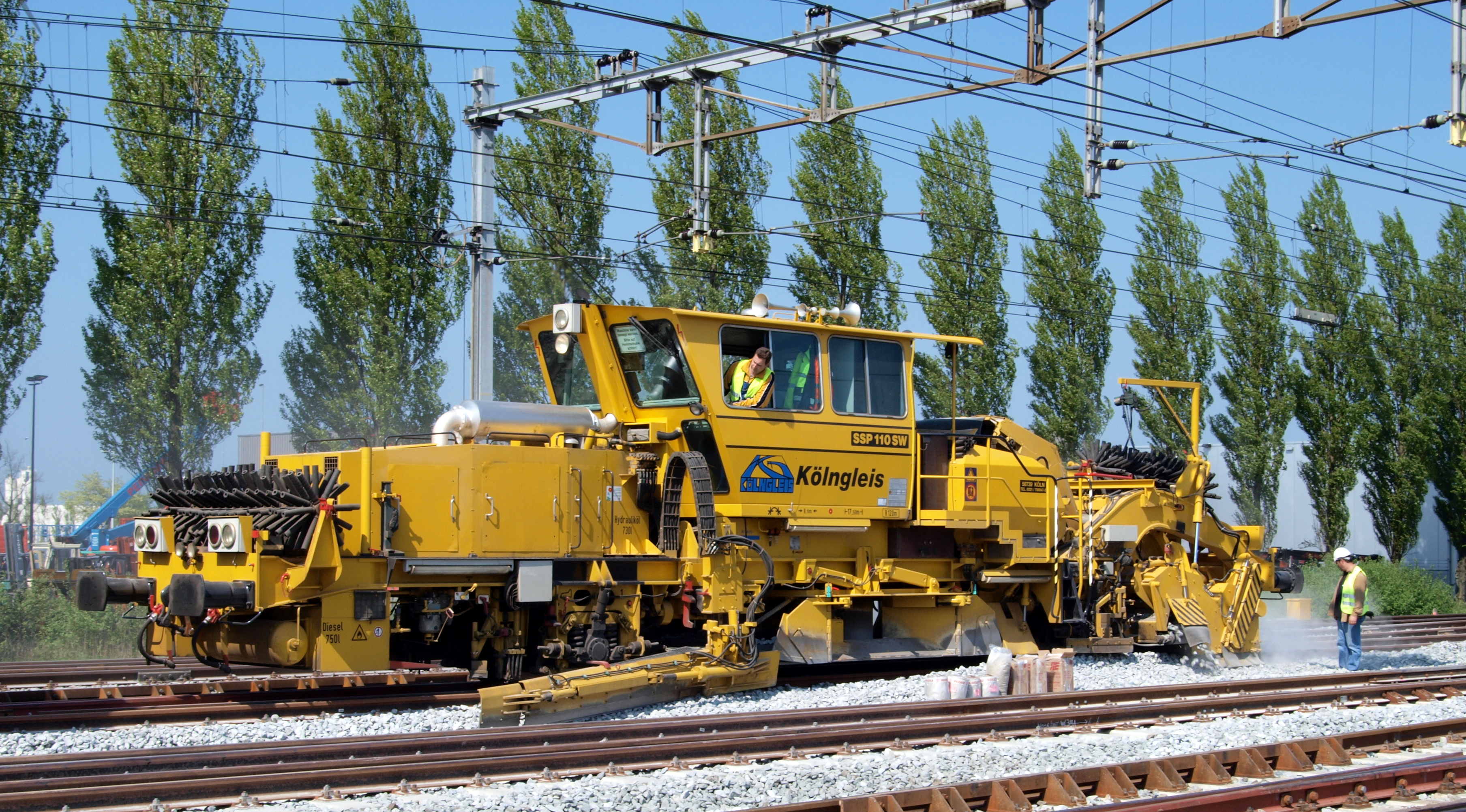 Kolngleis SSP110SW at Amsterdam p2 19April2009.